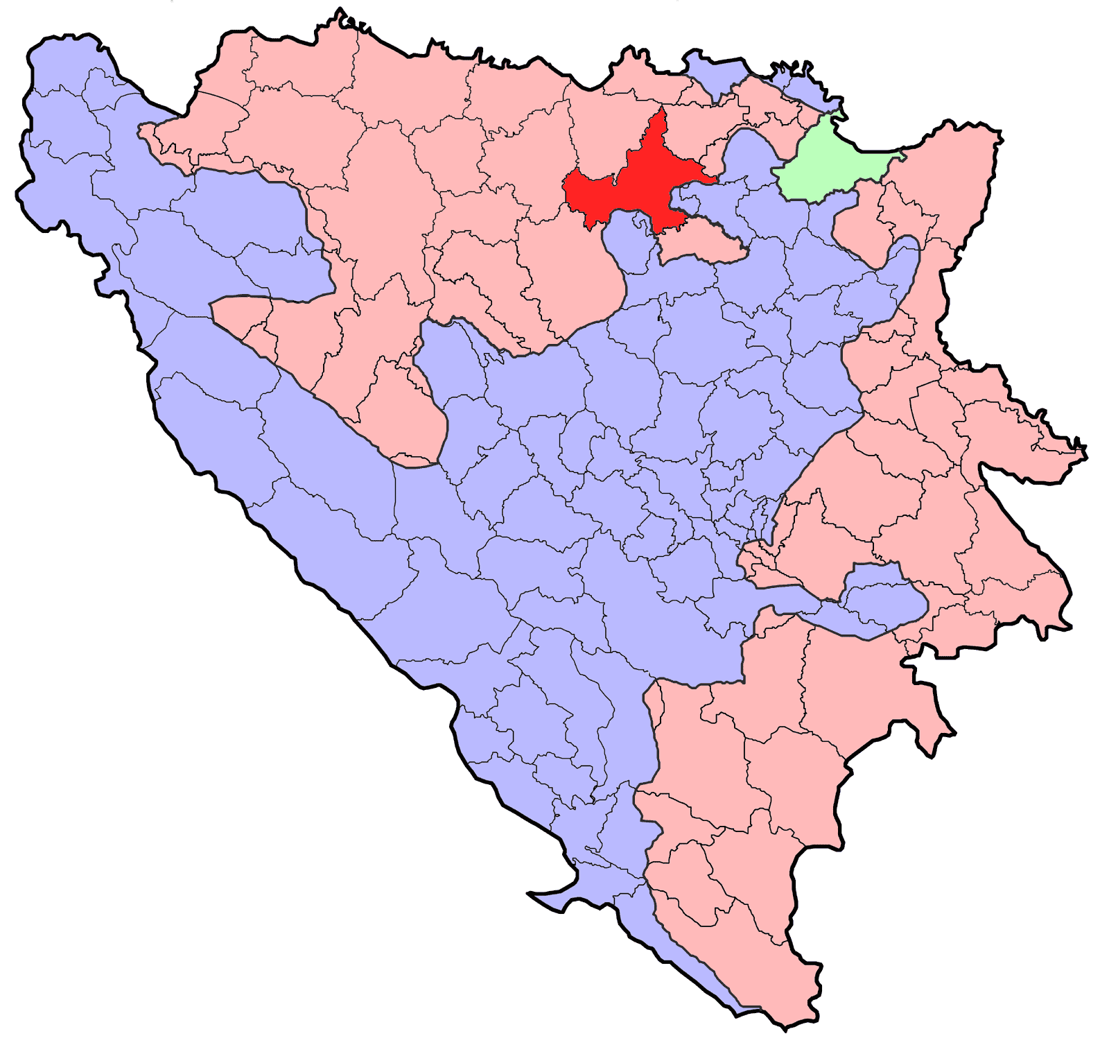 Republika Srpska (BiH) municipality